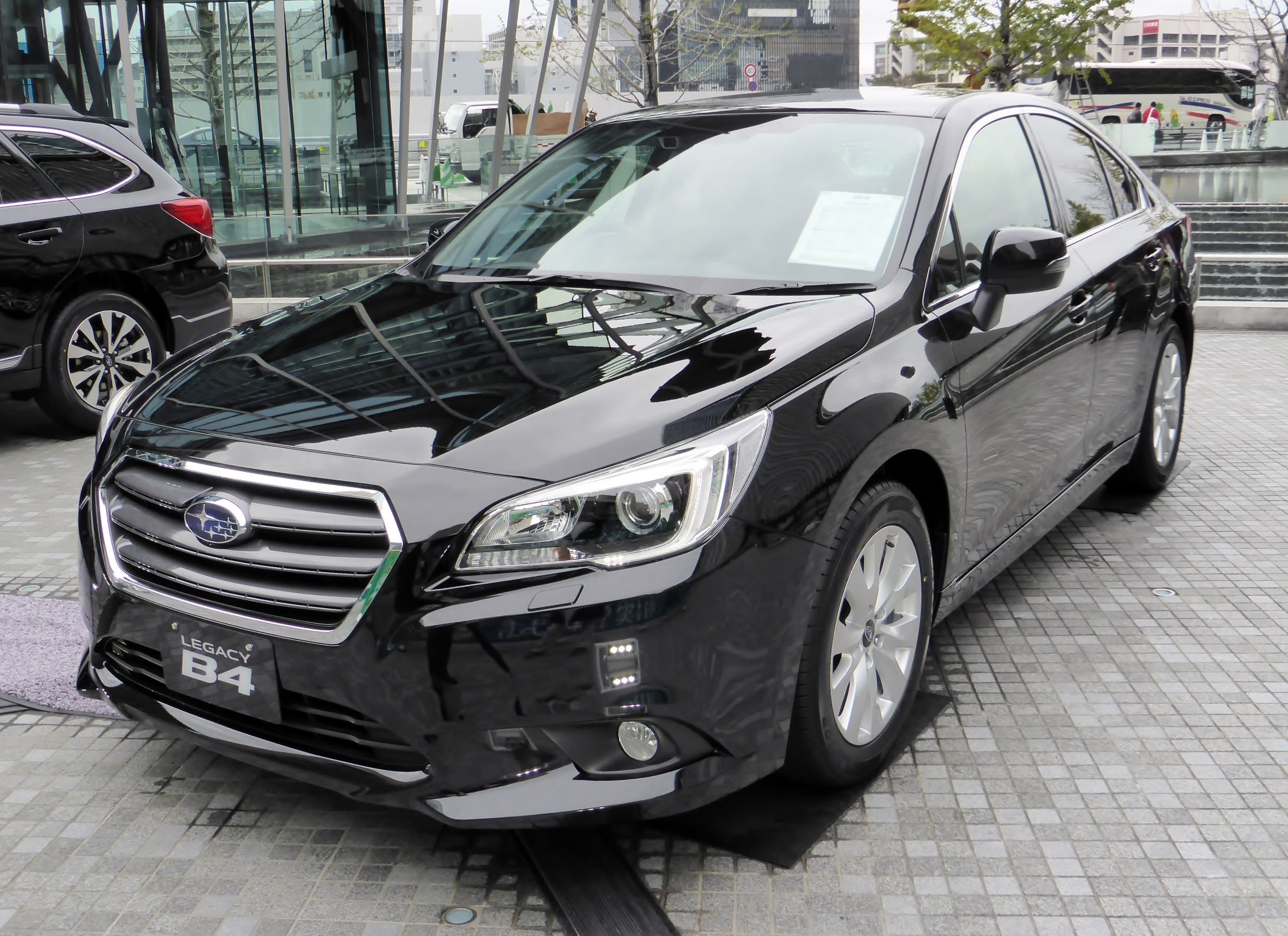 BN9型スバル・レガシィB4をフロントから撮影。